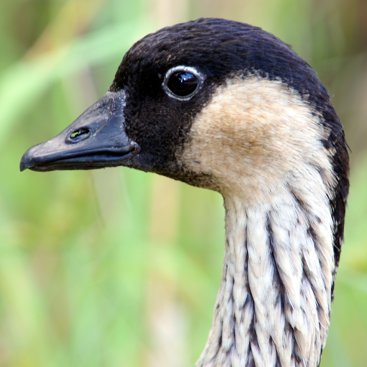 Нене, остров Гавайи